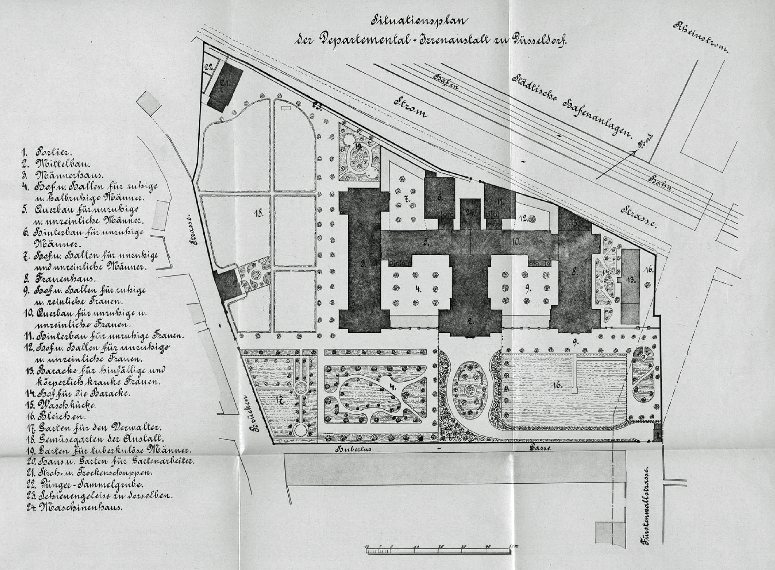 Situationsplan der Departemental-Irrenanstalt zu Düsseldorf, 1864